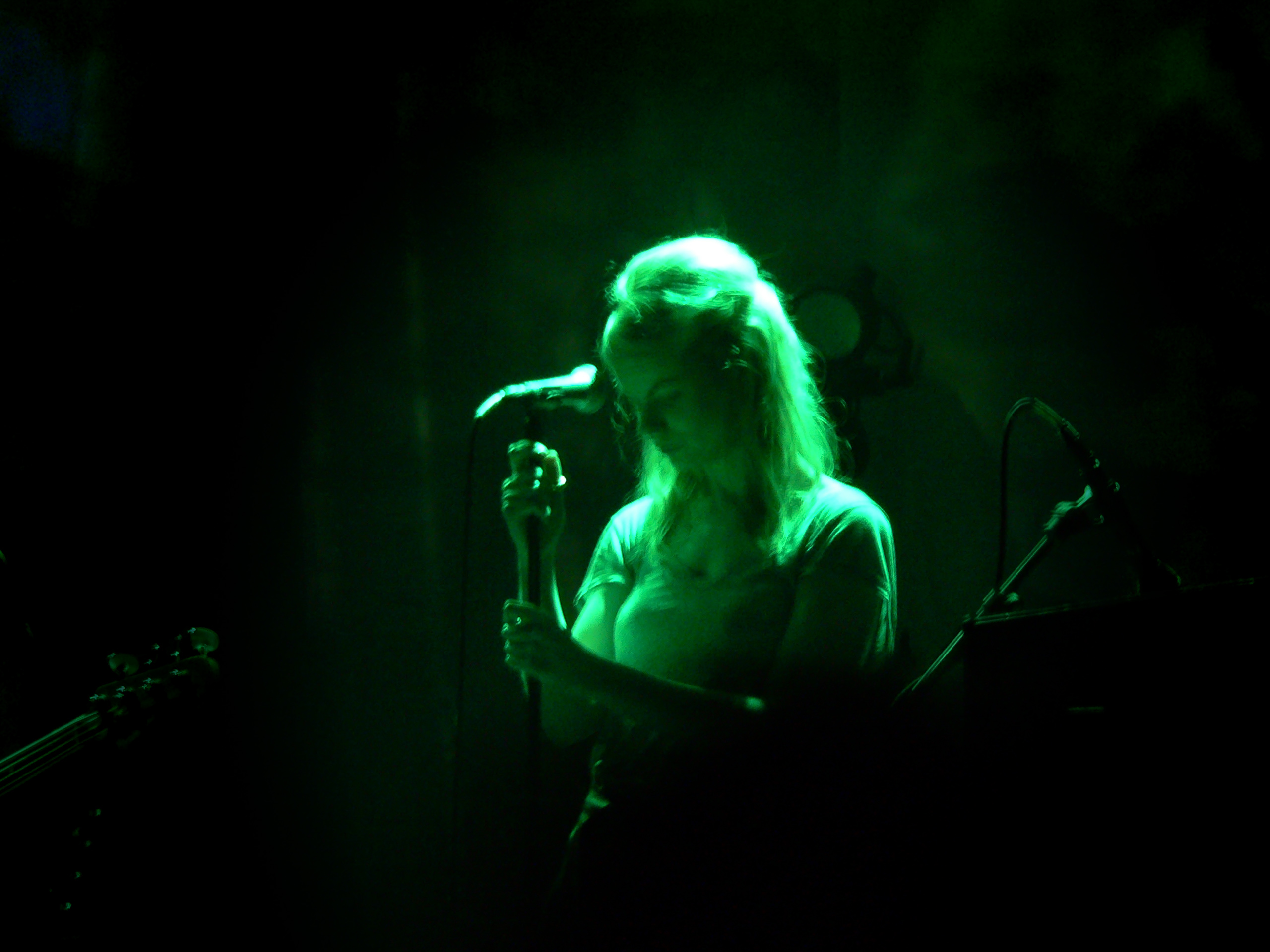 Under Byen-koncert på Vega.